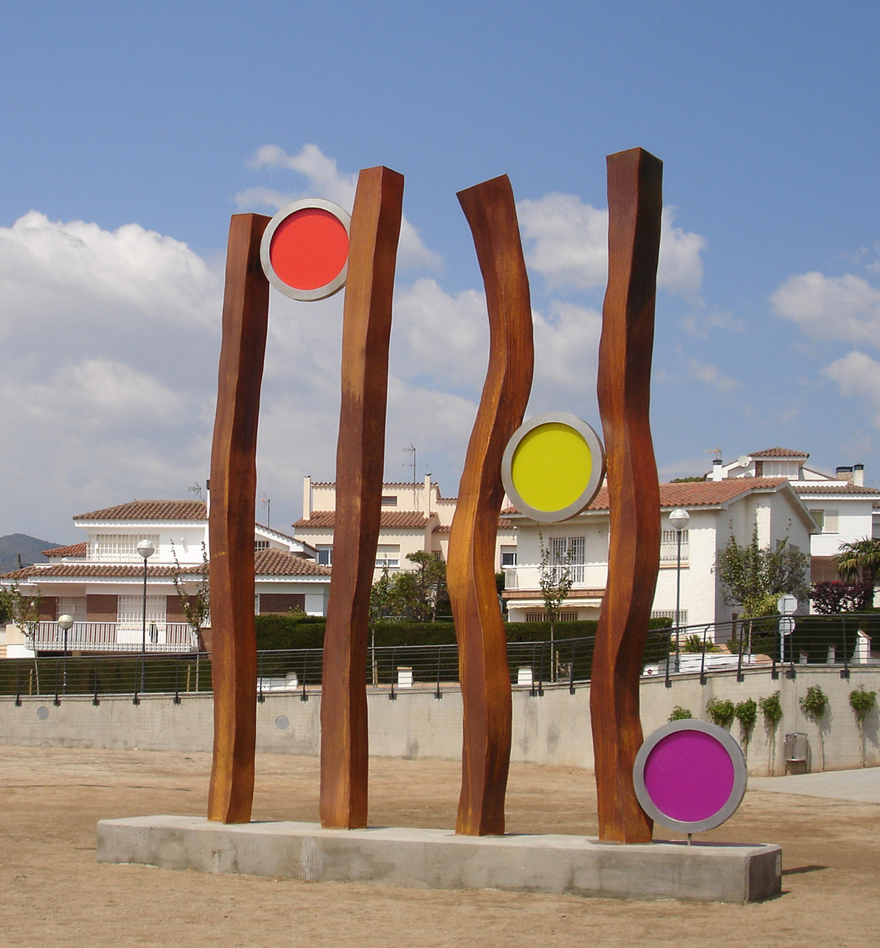 A la República. És un homenatge a tots els homes i dones del Masnou que es van comprometre en defensa de la segona República i dels valors que sustenten l’ideari republicà a Catalunya. Situada a la plaça de la República de la vila del Masnou.